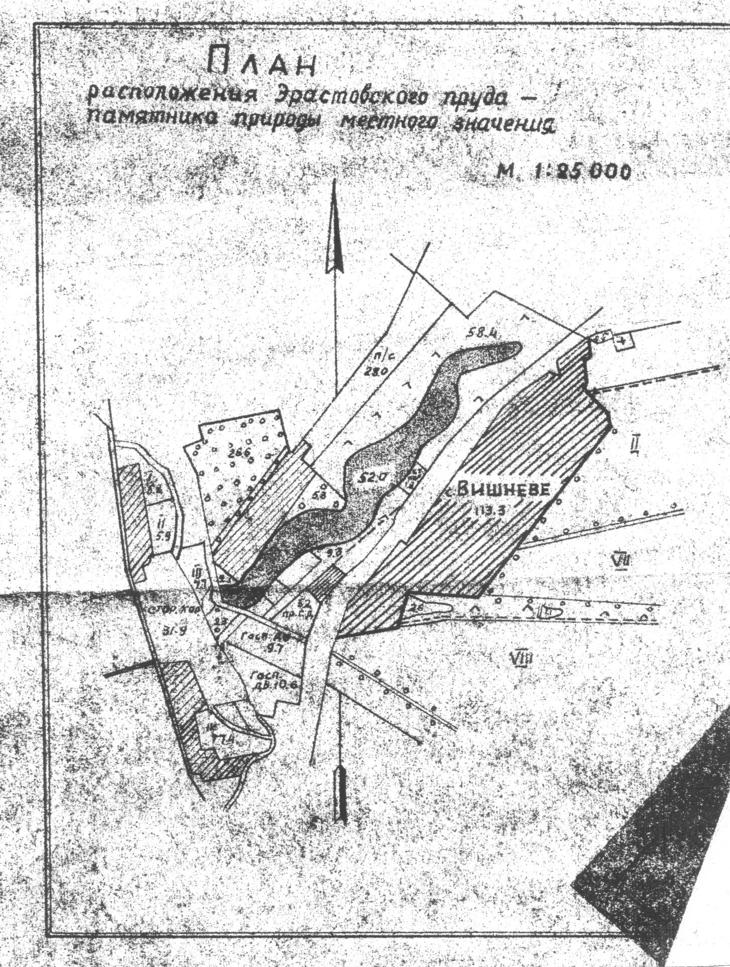 План-схема Ерастівського ставу. Ерастівський став - природоохоронна територія у П'ятихатському районі Дніпропетровської області, що була втрачена у 1972 році. Скан архівного документу.